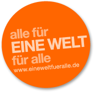 Logo des Schulwettbewerbes des Bundespräsidenten zur Entwicklungspolitik